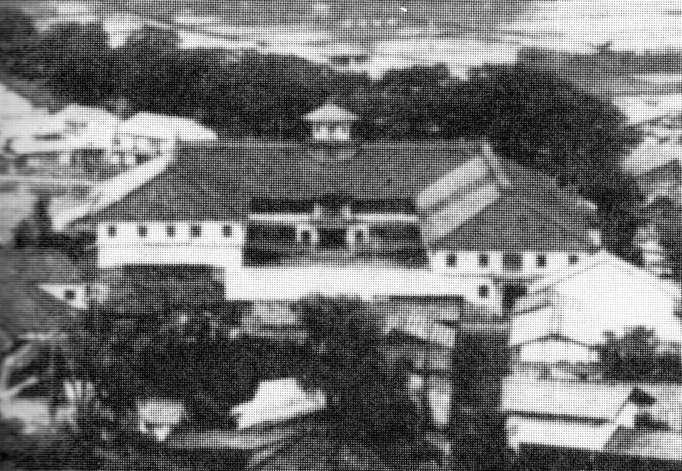 1879年に諏訪市に新築された高島学校の校舎。1906年取り壊し。